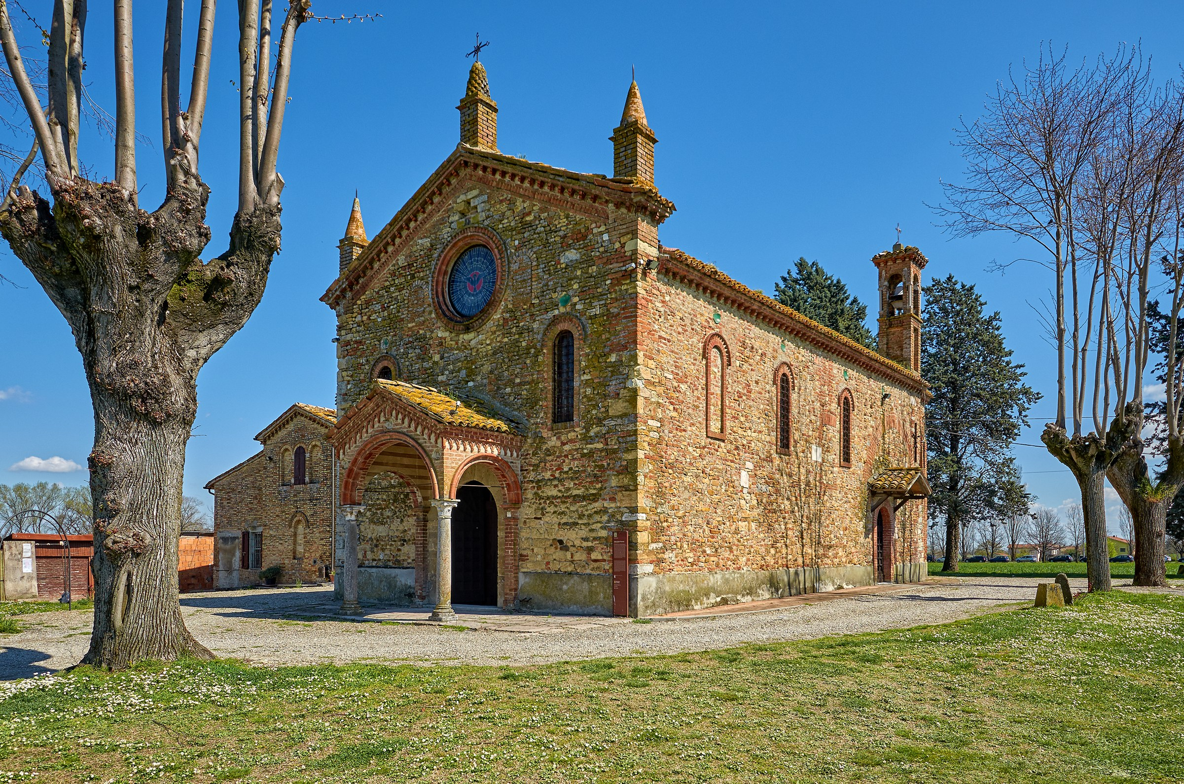 Chiesa di San Nicomede, vista di tre quarti